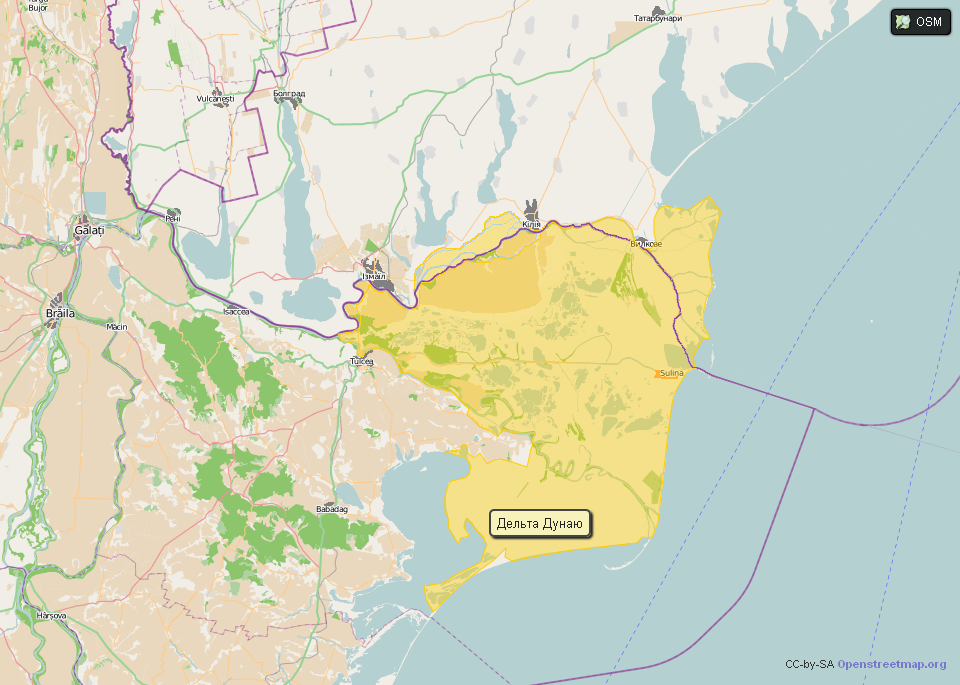 Зображення дельти Дунаю поряд із навколишніми територіями.